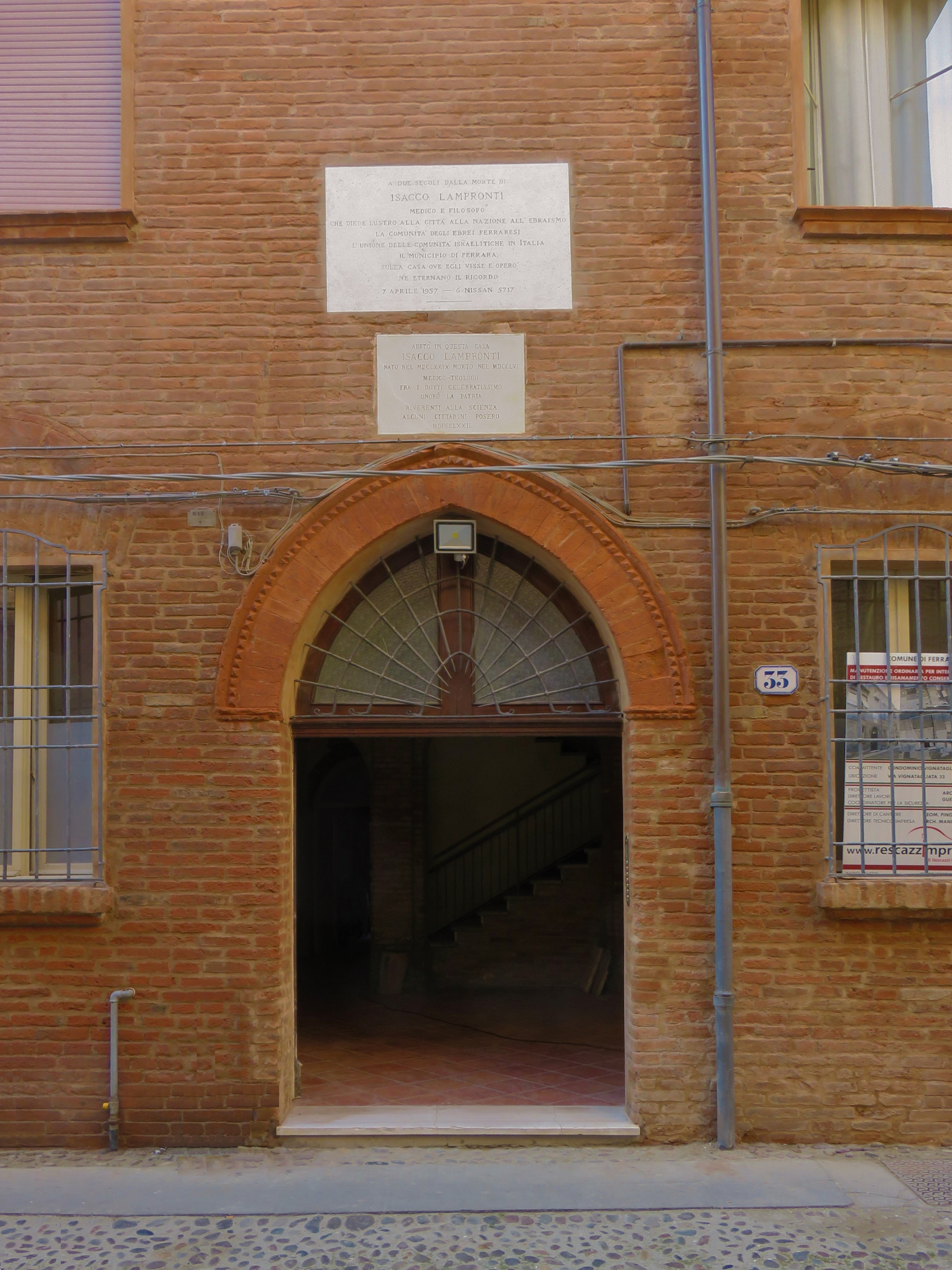 Ex ghetto ebraico di Ferrara - Casa di Isacco Lampronti in Via Vignatagliata 33